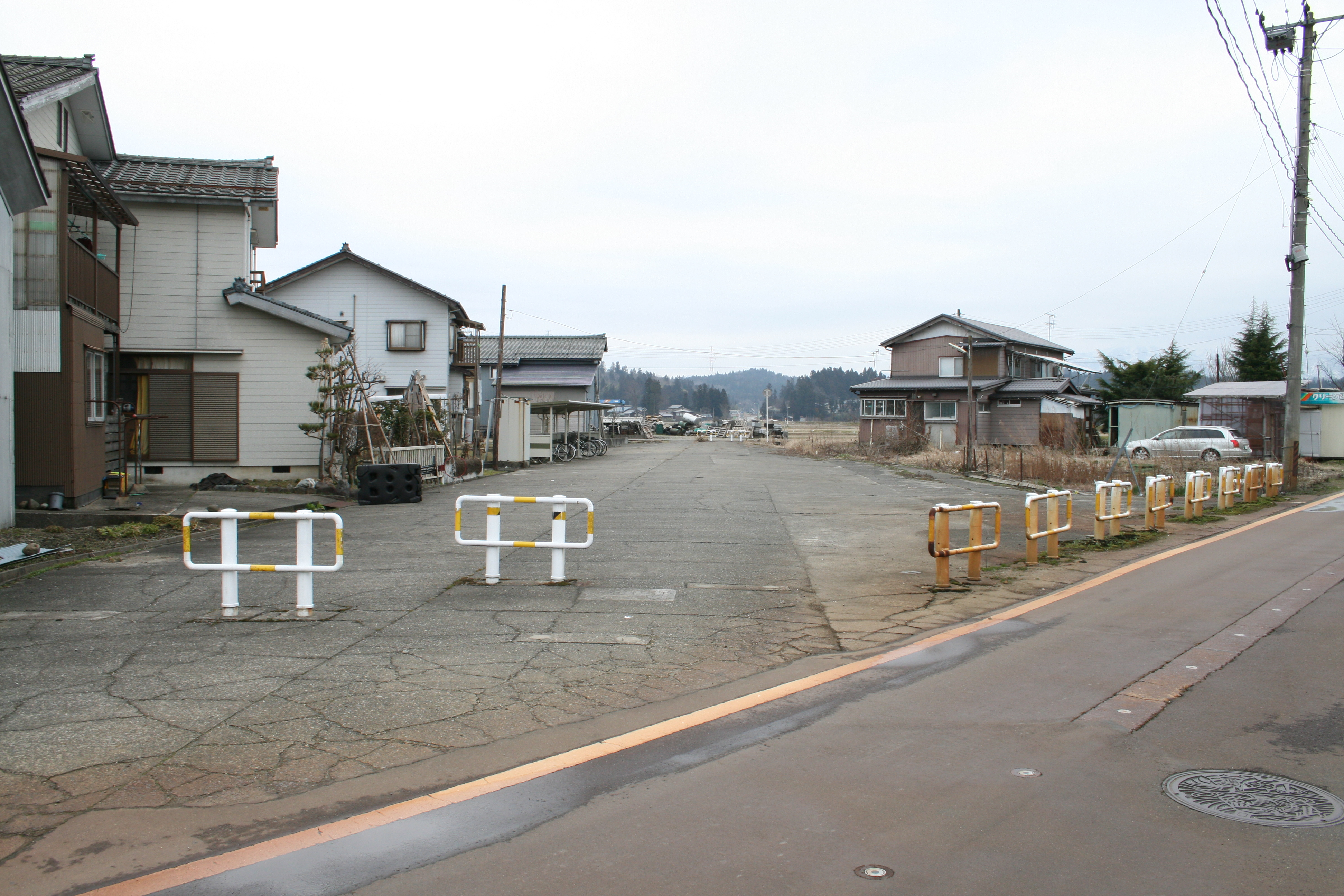 栃尾鉄道上北谷駅跡。自転車道の終点となっており、栃尾側はこの先400mほど路盤が消滅している。